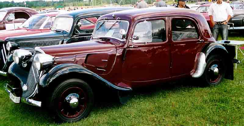 Citroen 11 Berline Legere 1939